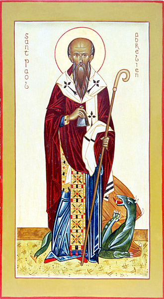 L'icône de St. Pol Aurélien peinte pour l'Association orthodoxe sainte Anne (Bretagne).